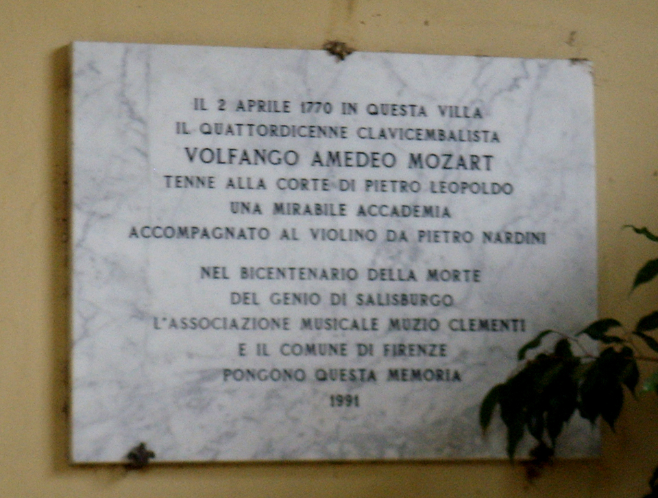 Villa_di_Poggio_Imperiale, targa_mozart.